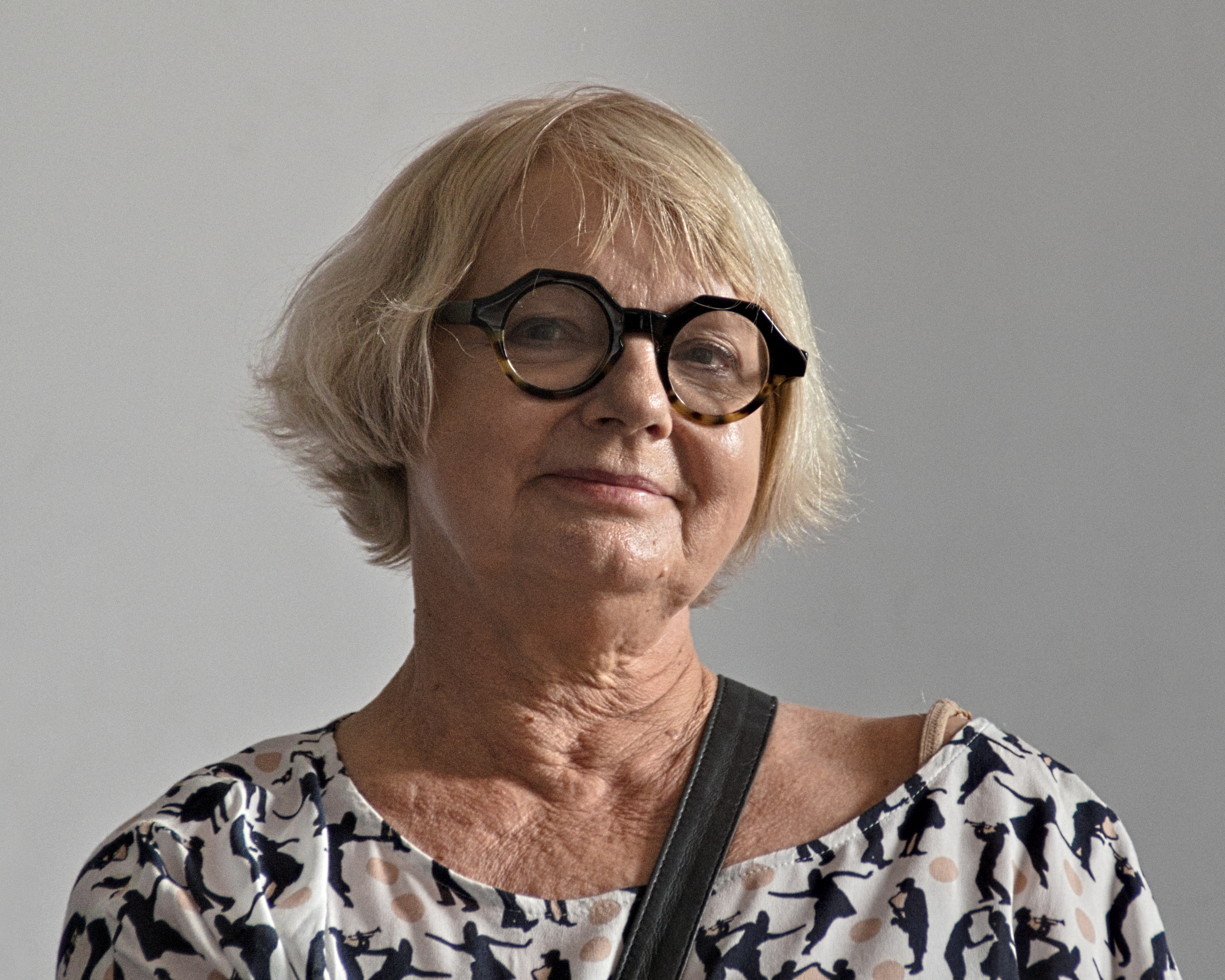 Ewa Wycichowska (1949– ), polska choregraf i tancerka; zdjęcie ze spotkania „z Jagodą Ignaczak i Ewą Wycichowską wokół książki „Istnienie grać”. Wstęp wolny | Teatr ROZBARK.” Wydarzenie towarzyszyło festiwalowi Bytom. Rozbark in Motion.